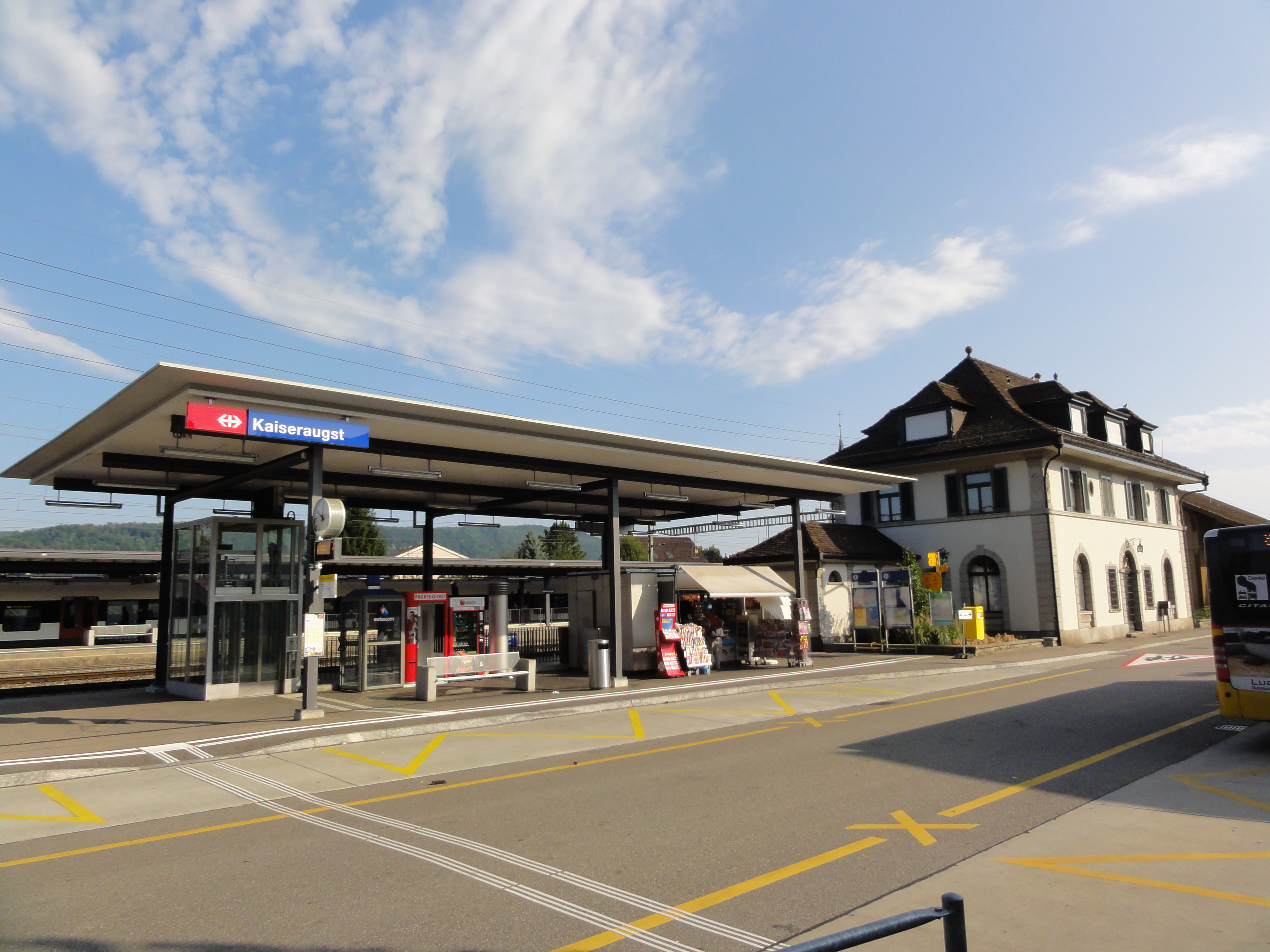 Kaiseraugst AG Bahnhof GPS data may be inaccurate. EXIF data regarding date and time may be inaccurate.